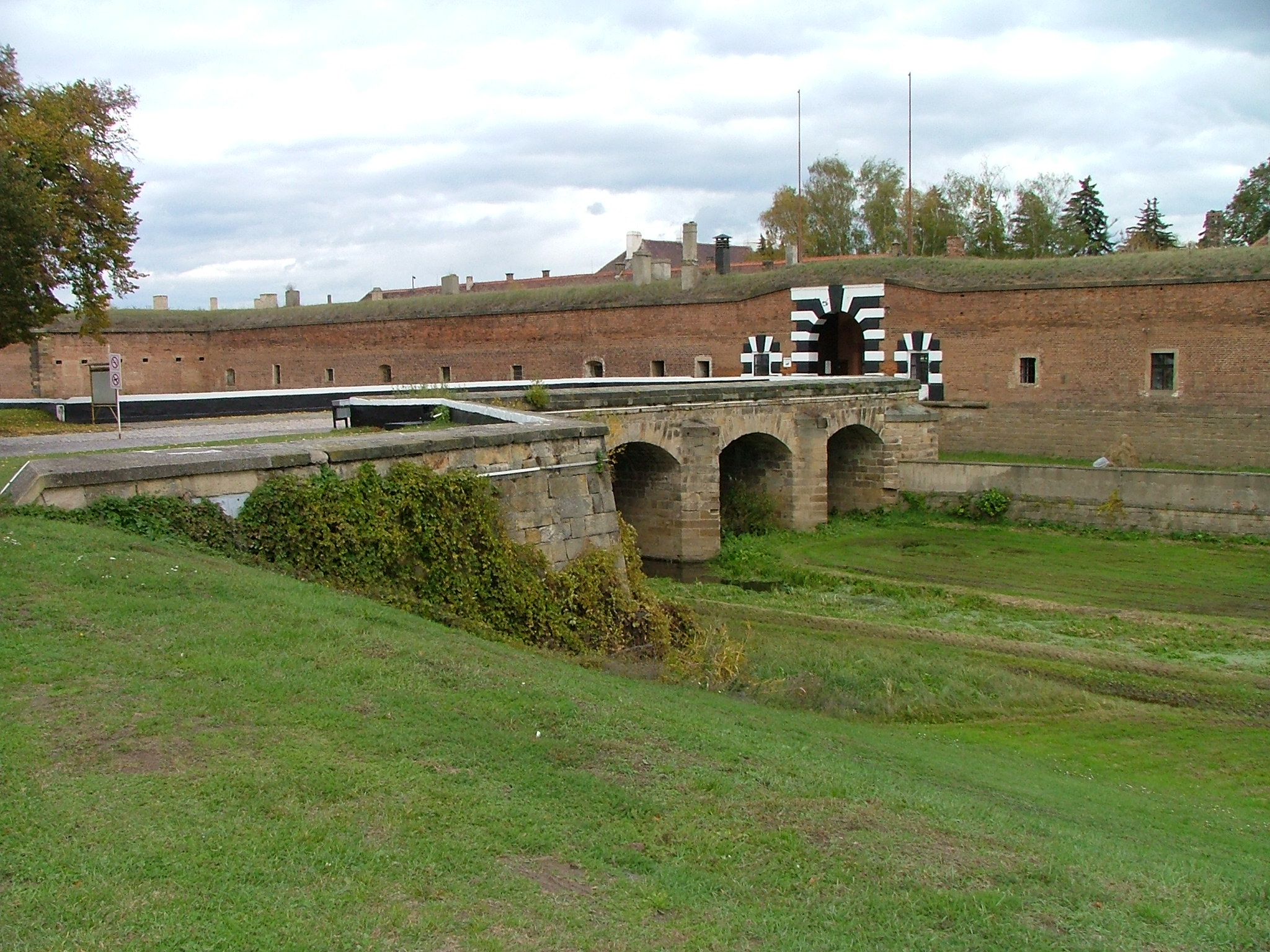 Koncentrační tábor Terezín, vstup do Malé pevnosti